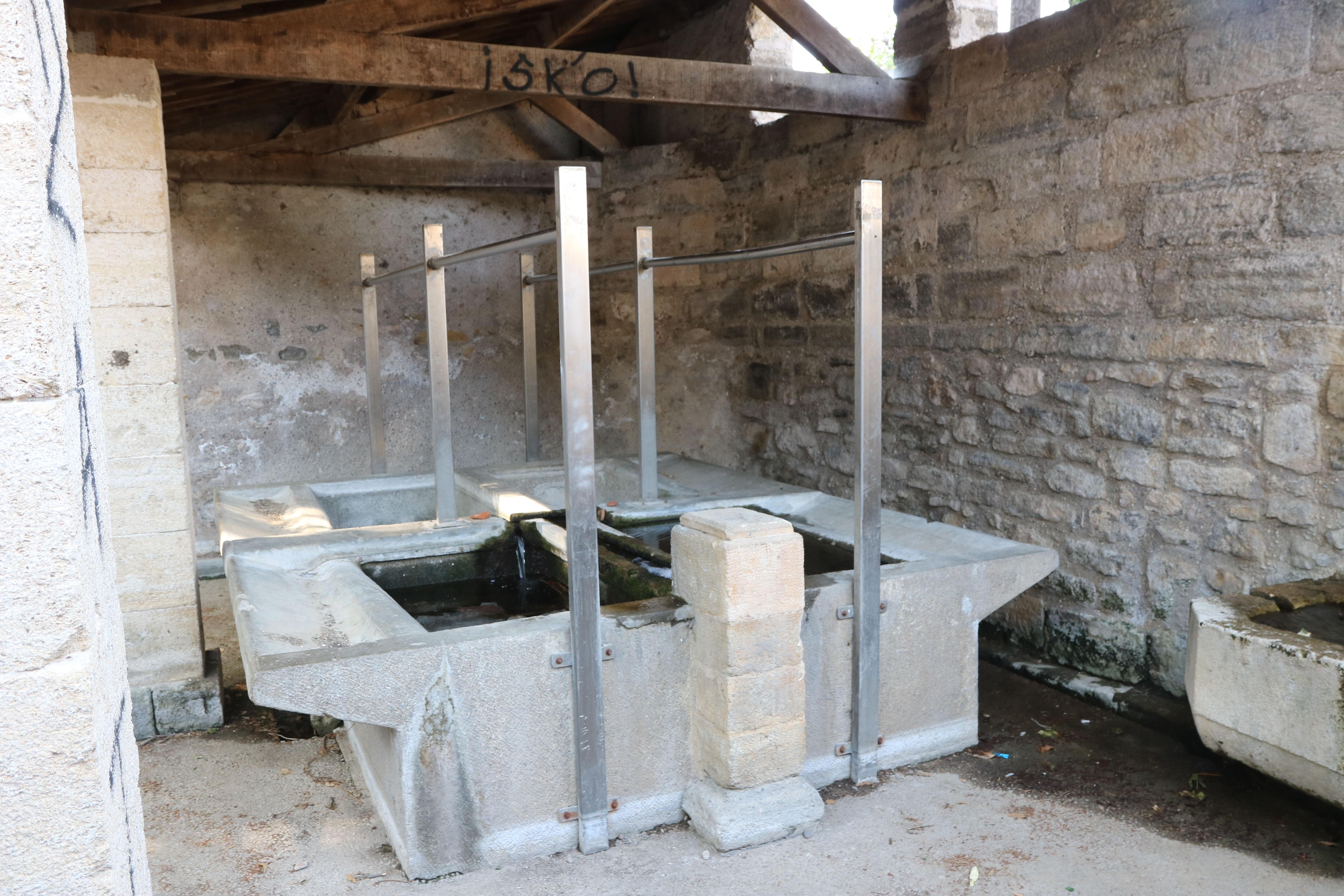 Adissan (Hérault) - lavoir